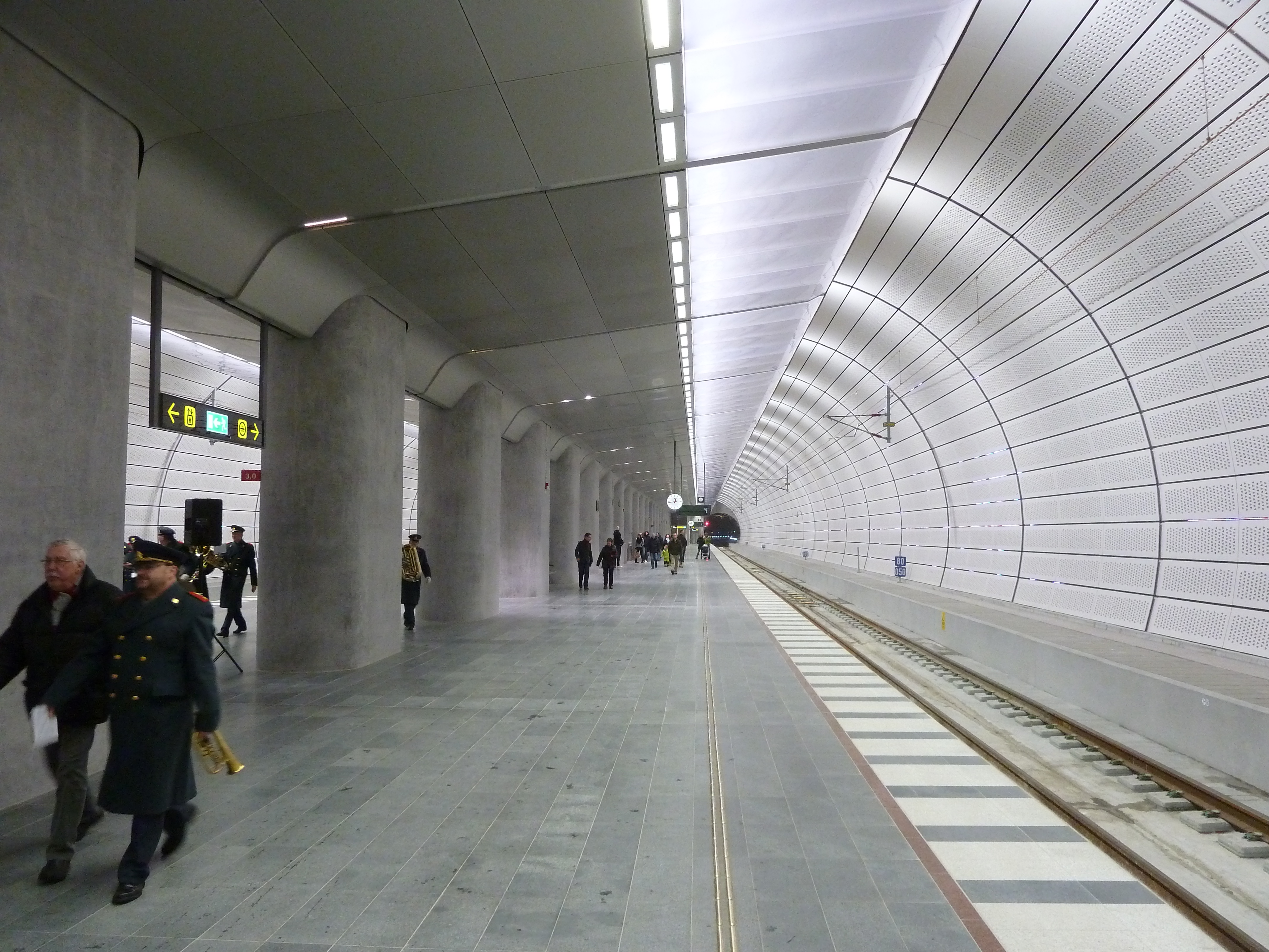 Stationen Triangeln